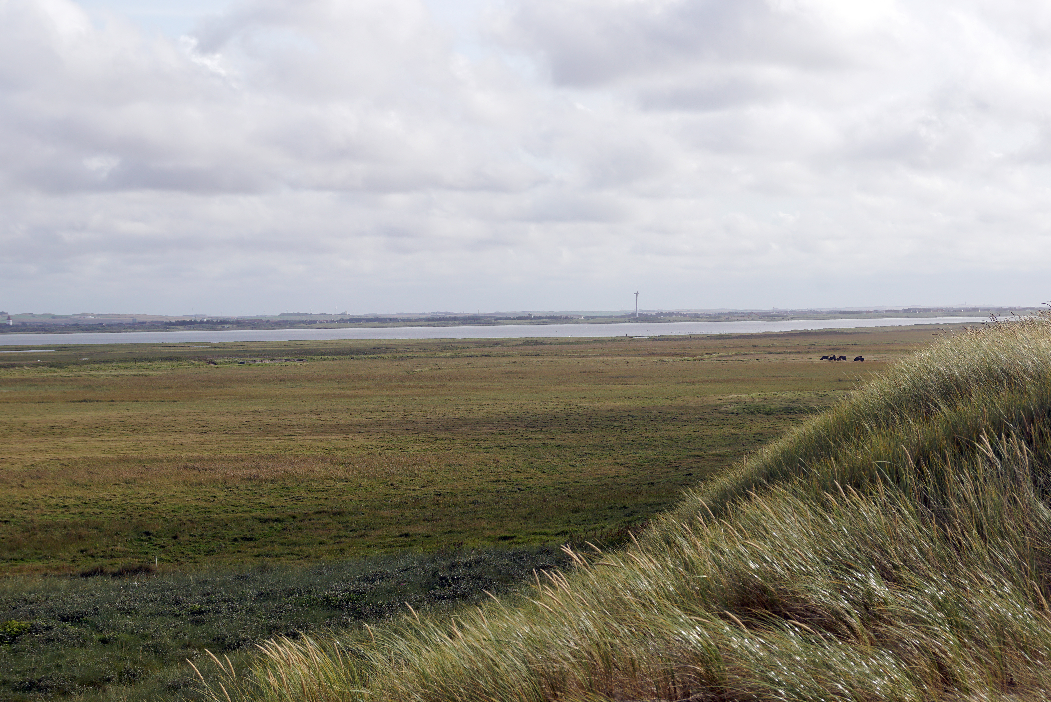 Strandenge på Harboøre Tange set mod nordøst med Harboøre i baggrunden.